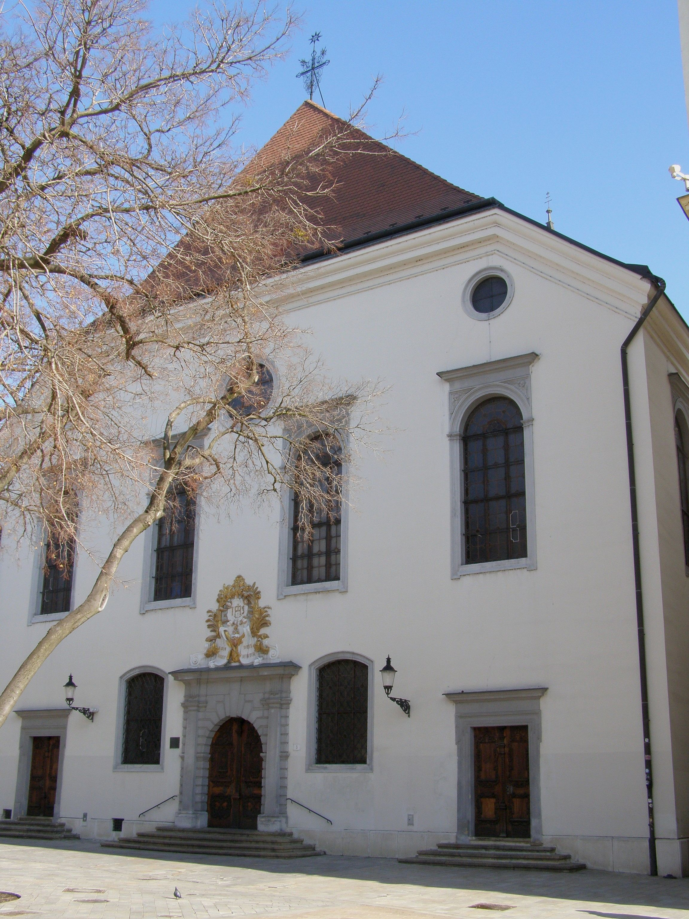 Priečelie Kostola Najsvätejšieho Spasiteľa v Bratislave